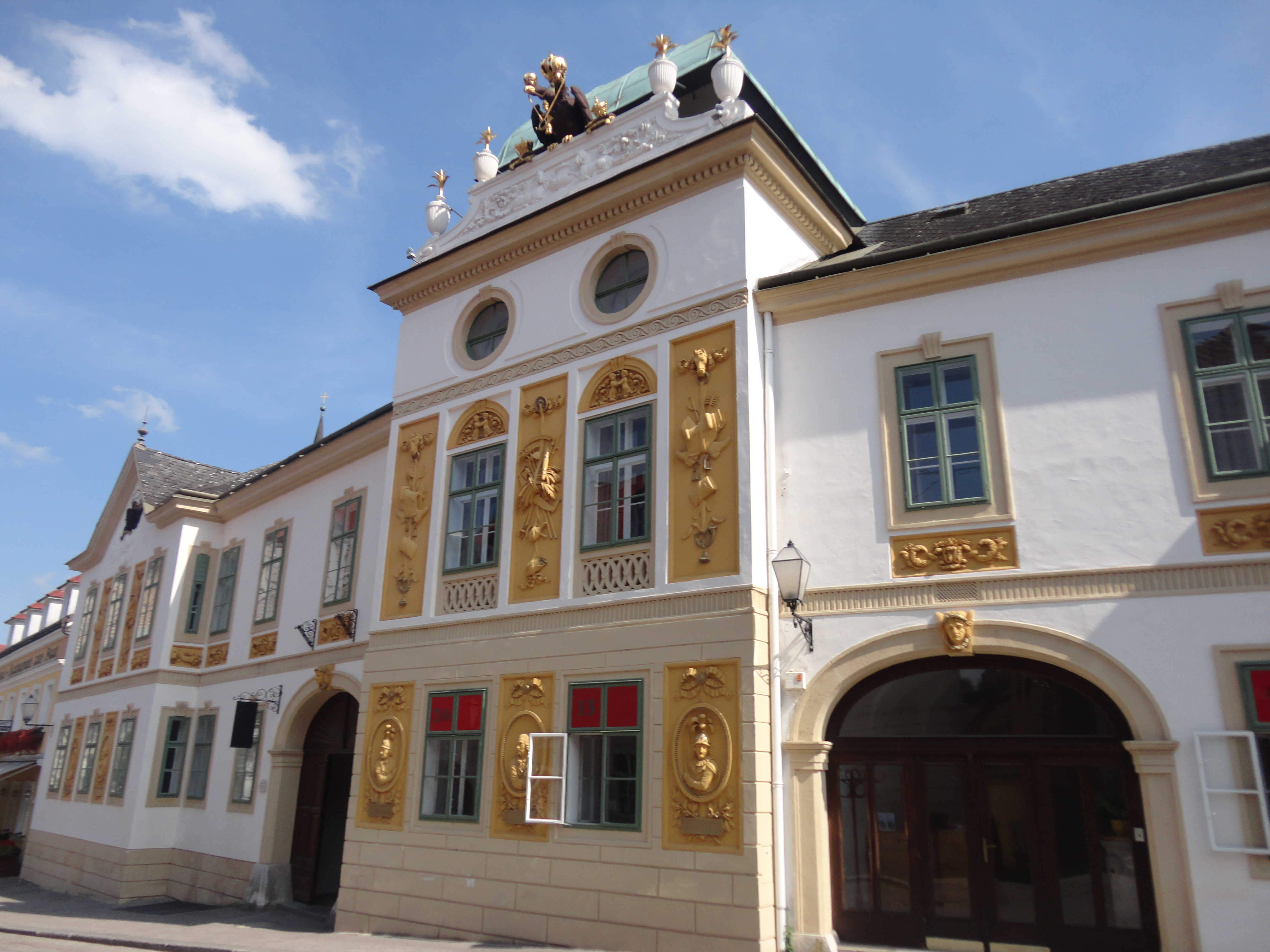 Altes Posthaus, Linzer Straße 3, 5; Melk